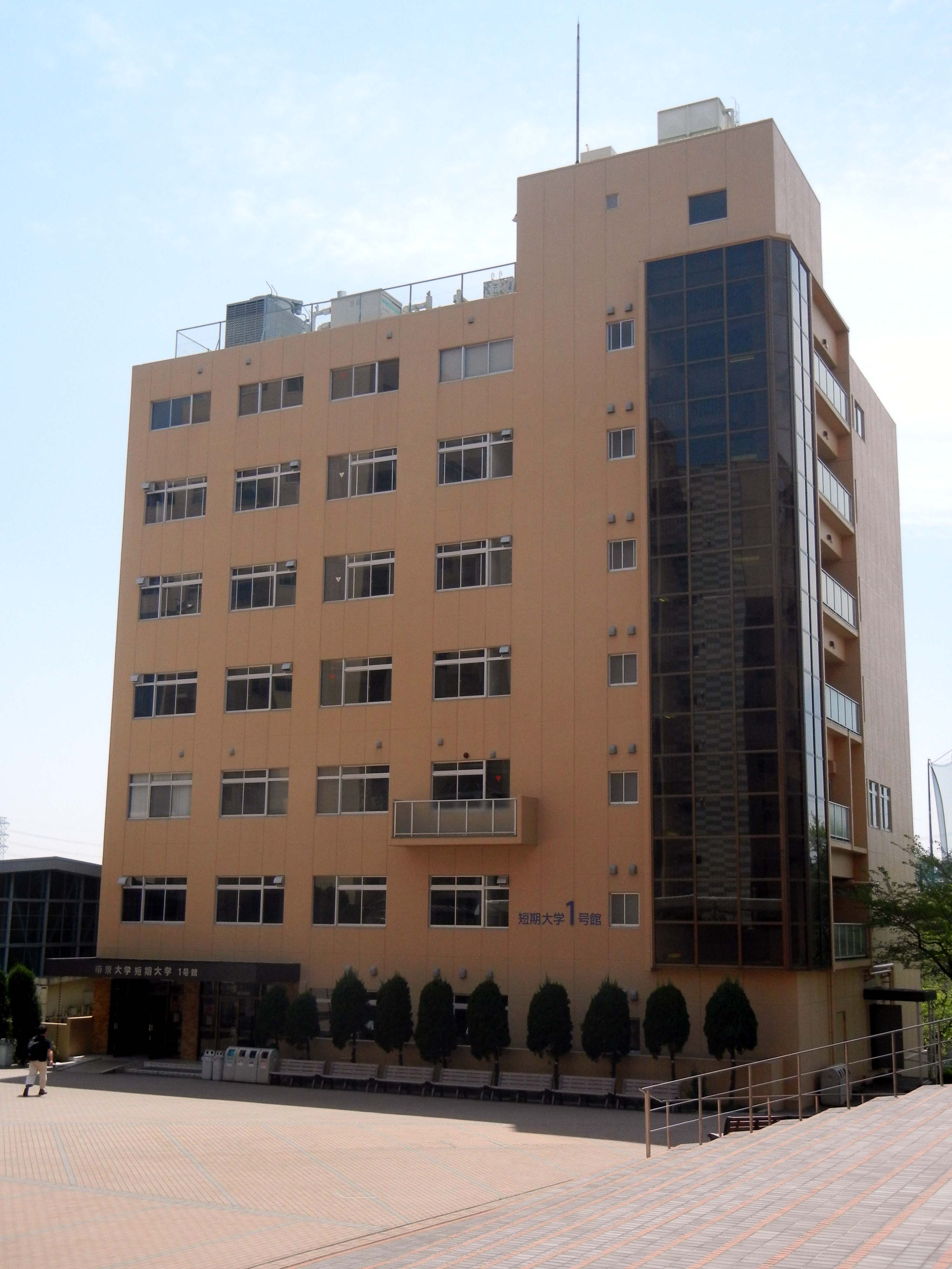 帝京大学八王子キャンパス短期大学1号館